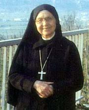 Scholastica Maria Rivata